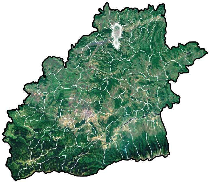 Medias jud Sibiu.